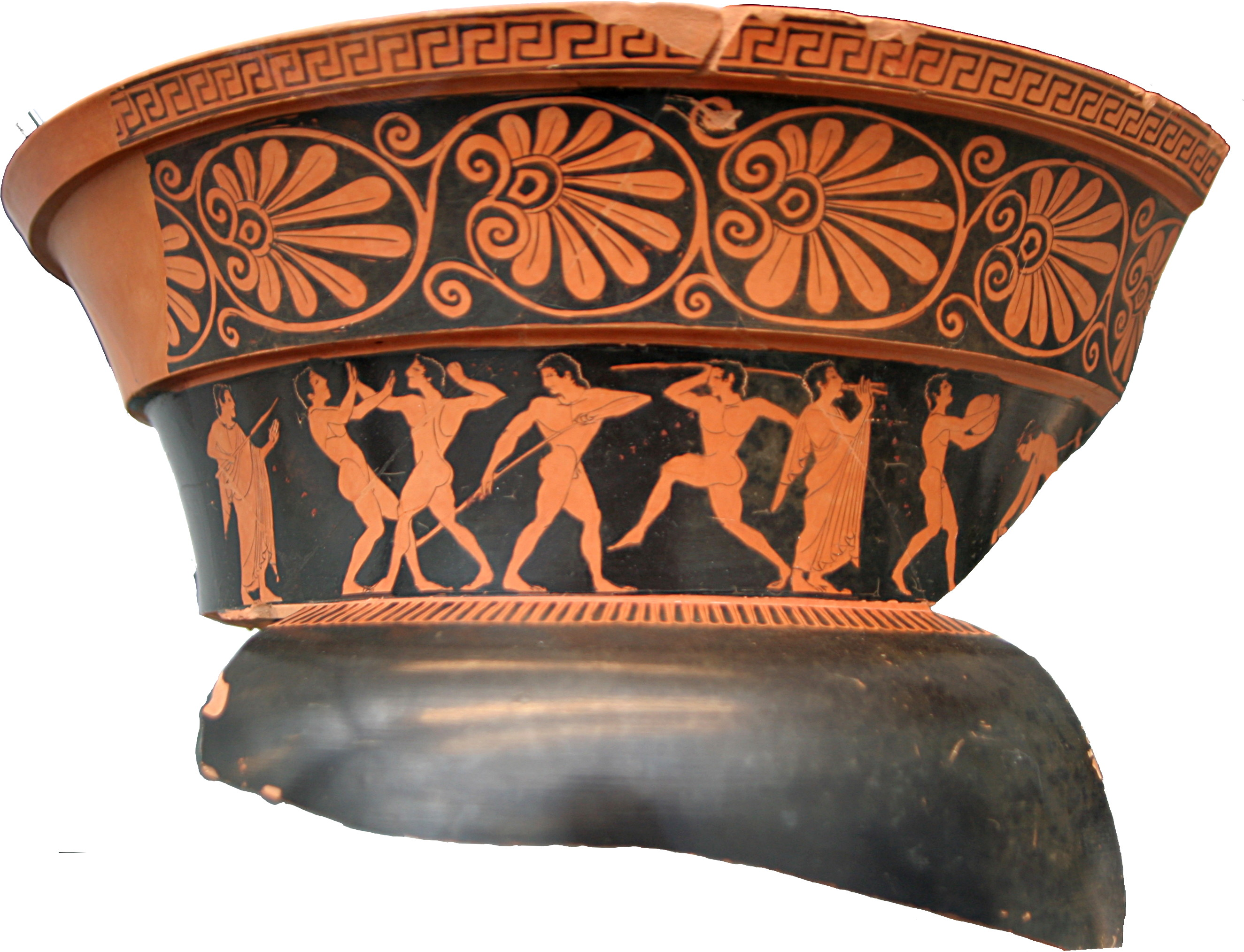 Diverse Athleten und ein Musikant mit Doppelflöte.